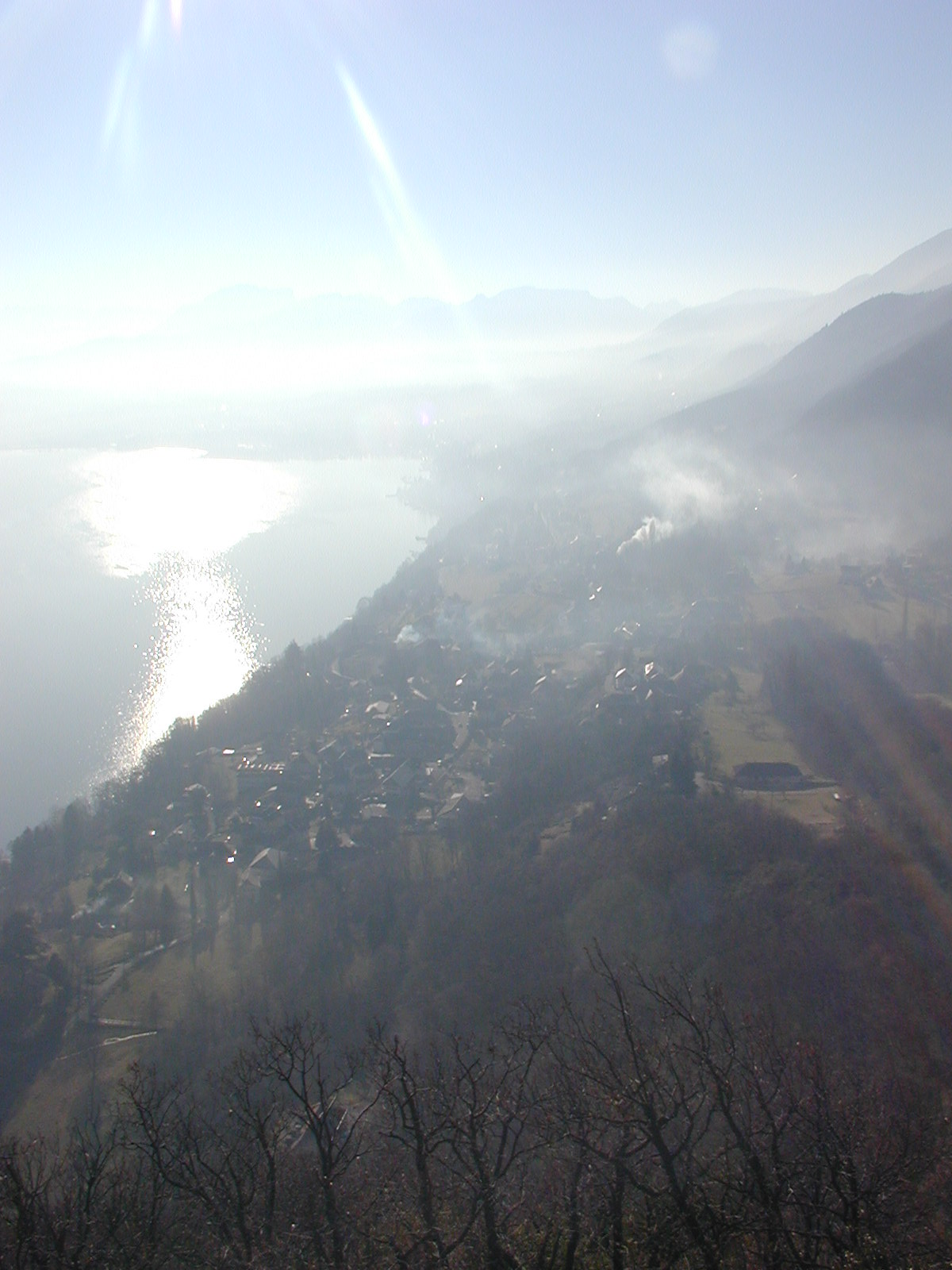 Ö temps ! suspends ton vol, et vous, heures propices ! Suspendez votre cours : Laissez-nous savourer les rapides délices Des plus beaux de nos jours ! (Lamartine) Moment magique au-dessus du lac du Bourget, nous baignions dans un azur argenté. La photo restitue un peu de ce moment extraordinaire. Photo prise ce matin 11 janvier 2005 Semnoz Les indications des métadonnées concernant les dates sont fausses, il s'agit du 11 janvier 2005 vers 10h30 -Semnoz 27 septembre 2005 à 13:47 (CEST) Semnoz, January 2005